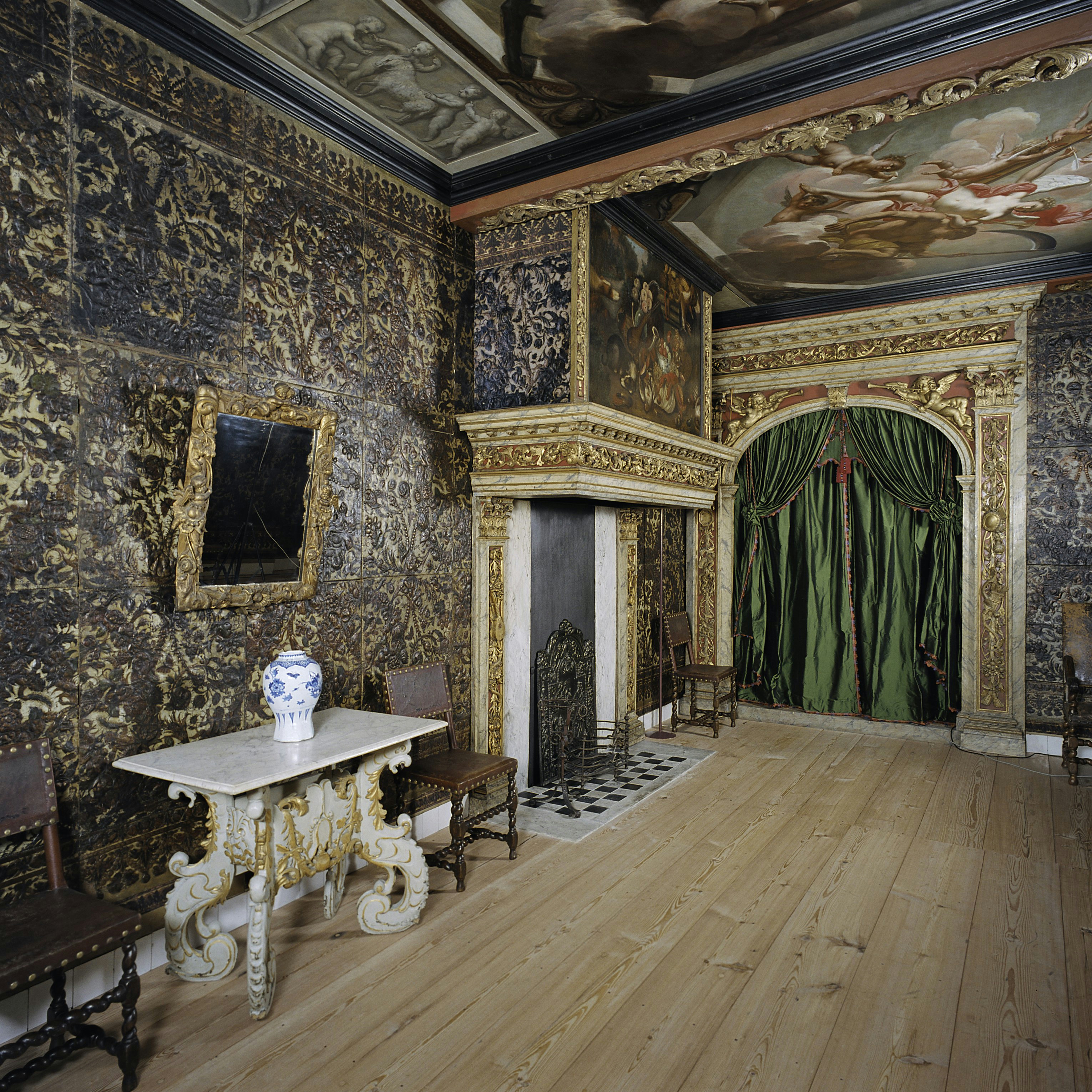 Woonhuis De Rozijnkorf: Interieur, overzicht kamer (opmerking: Gefotografeerd voor Monumenten In Nederland Zuid-Holland)